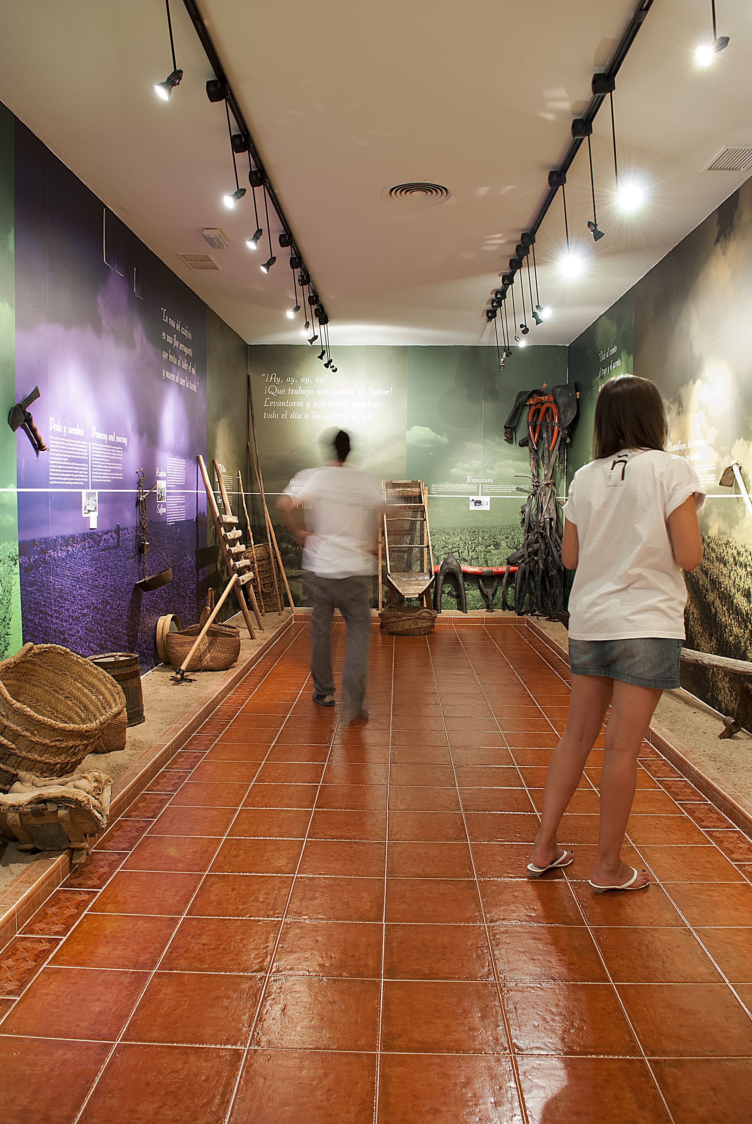 Estudiantes de español en el Museo "La Rosa del Azafrán" de La Solana